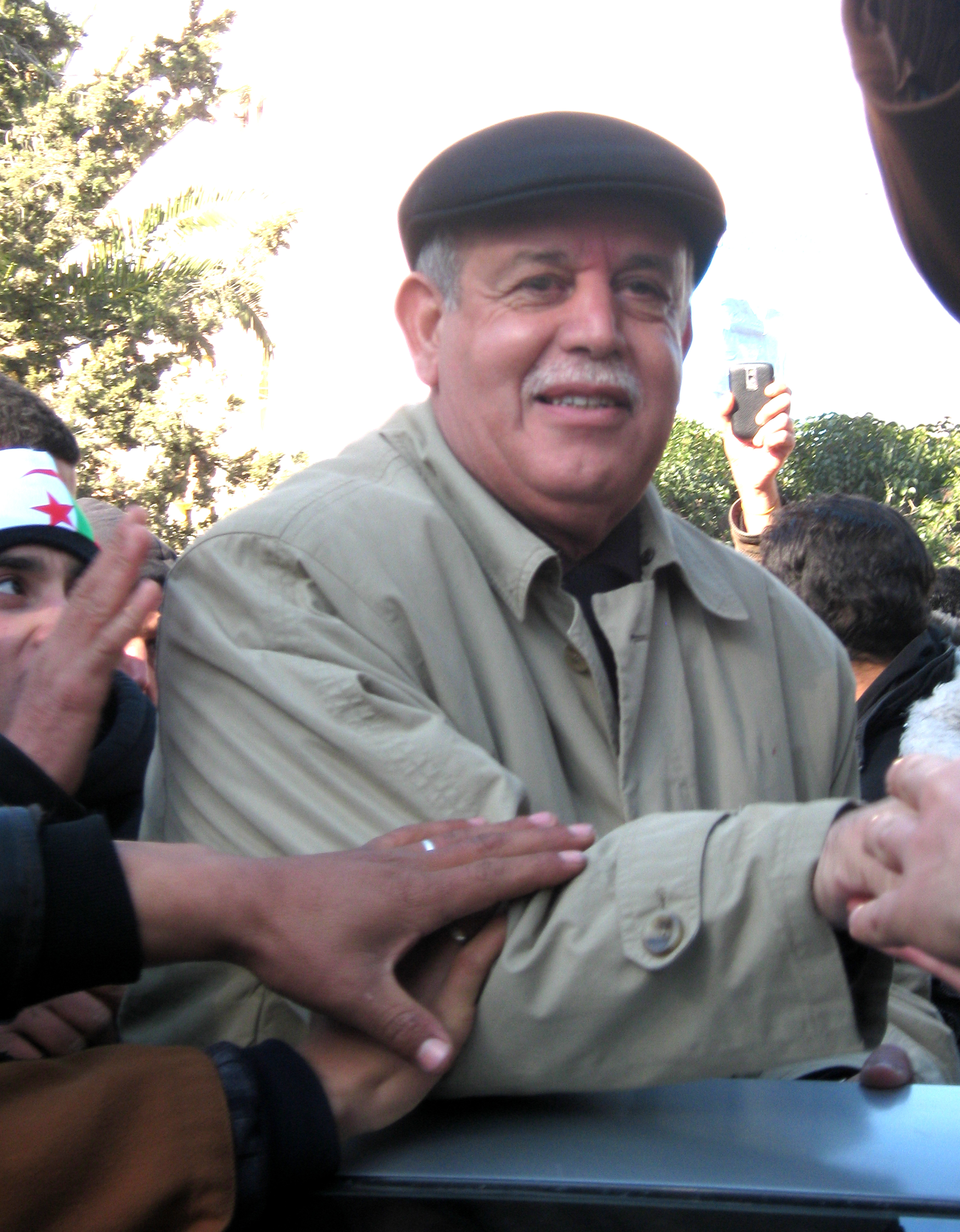 Rabeh Saadane a Batna en décembre 2009